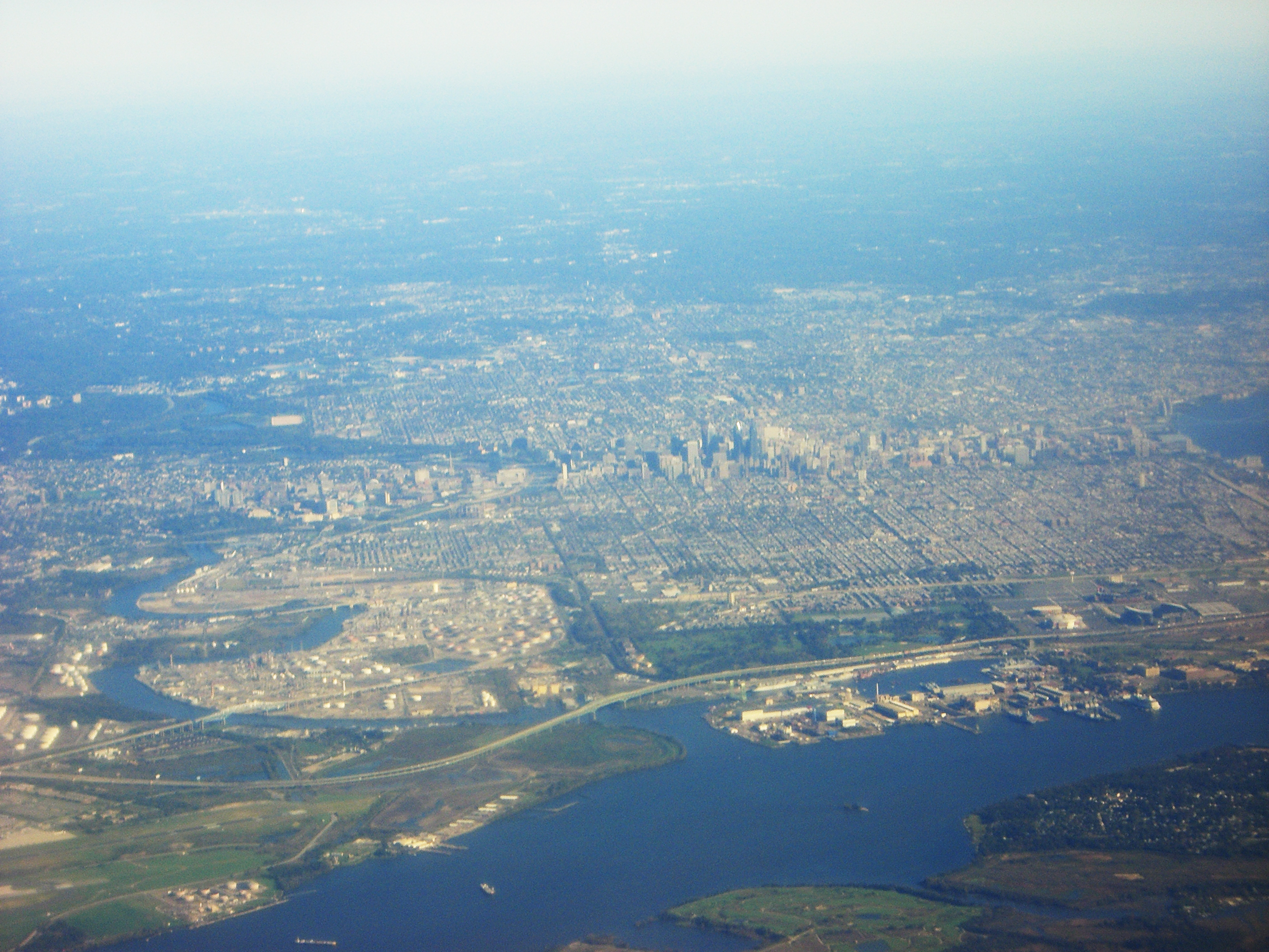 Philadelphia, USA